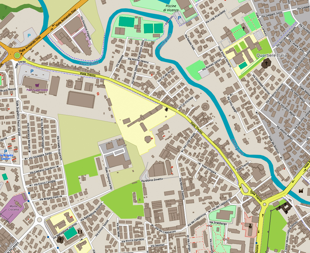 Borgo Santa Croce e viale Trento